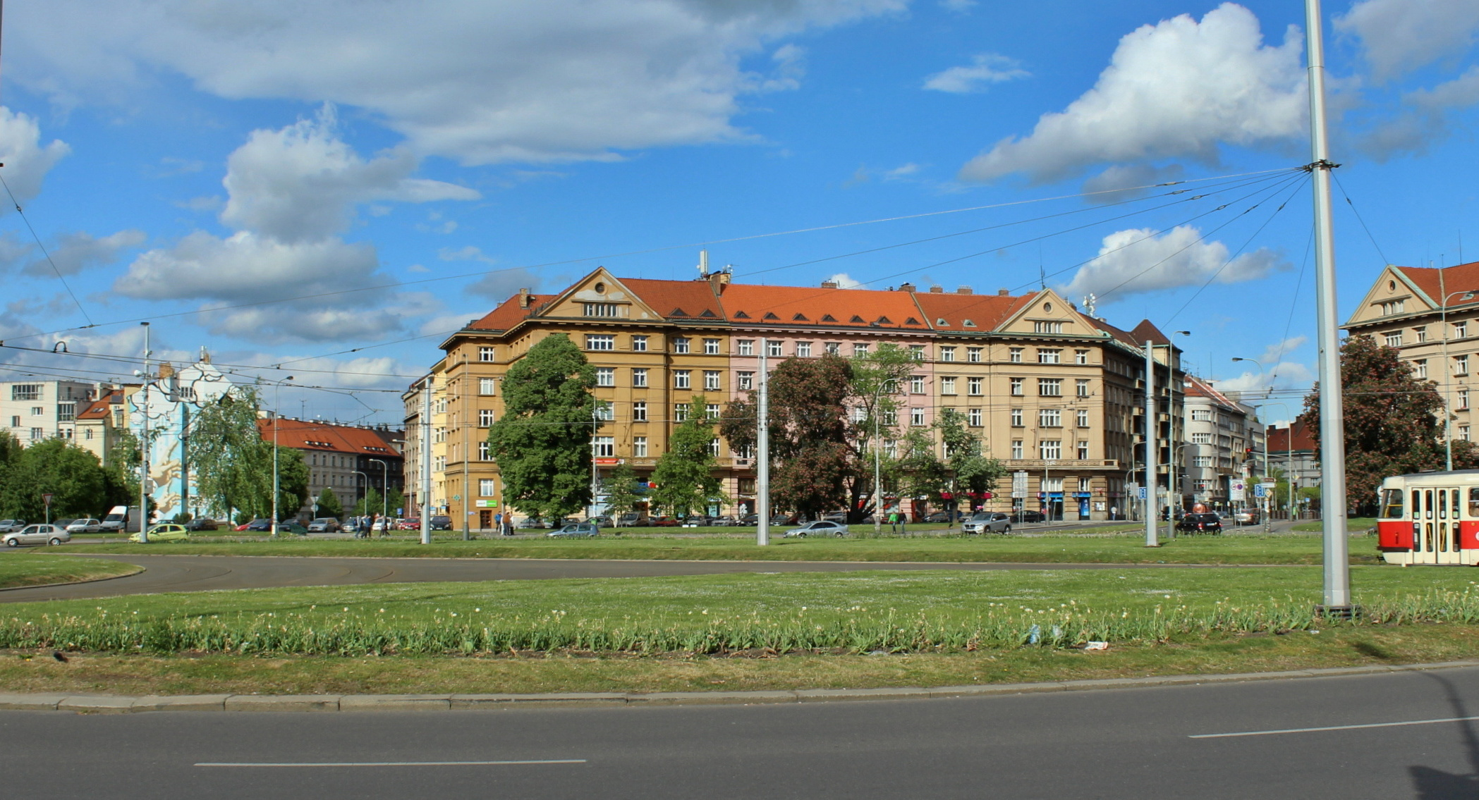 Dejvice Vítězné náměstí